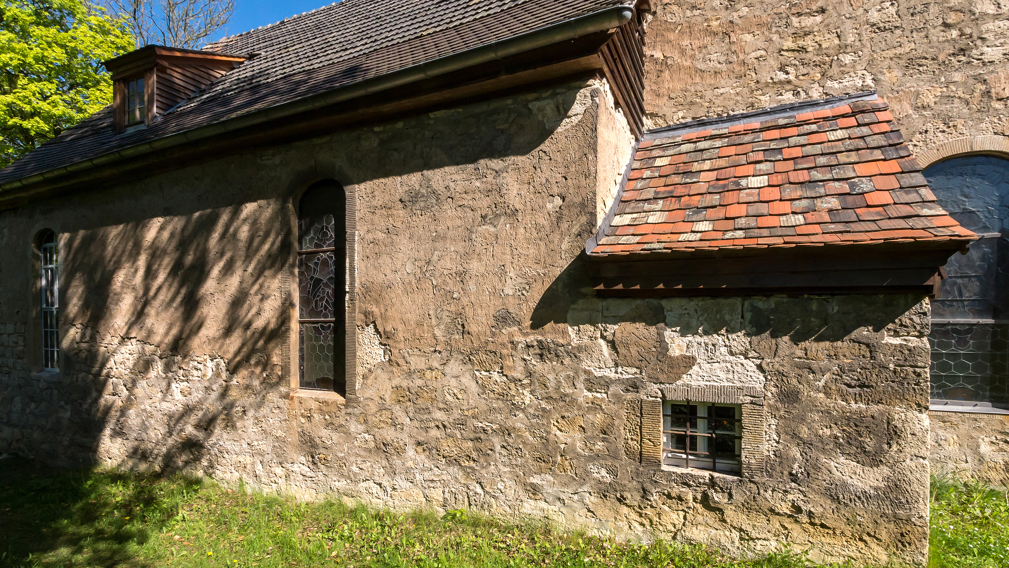 Dorfkirche Cospeda in Jena, FFH-Gebiet DE-5035-307 „Kirche Cospeda“ (Wochenstube der Kleinen Hufeisennase); III